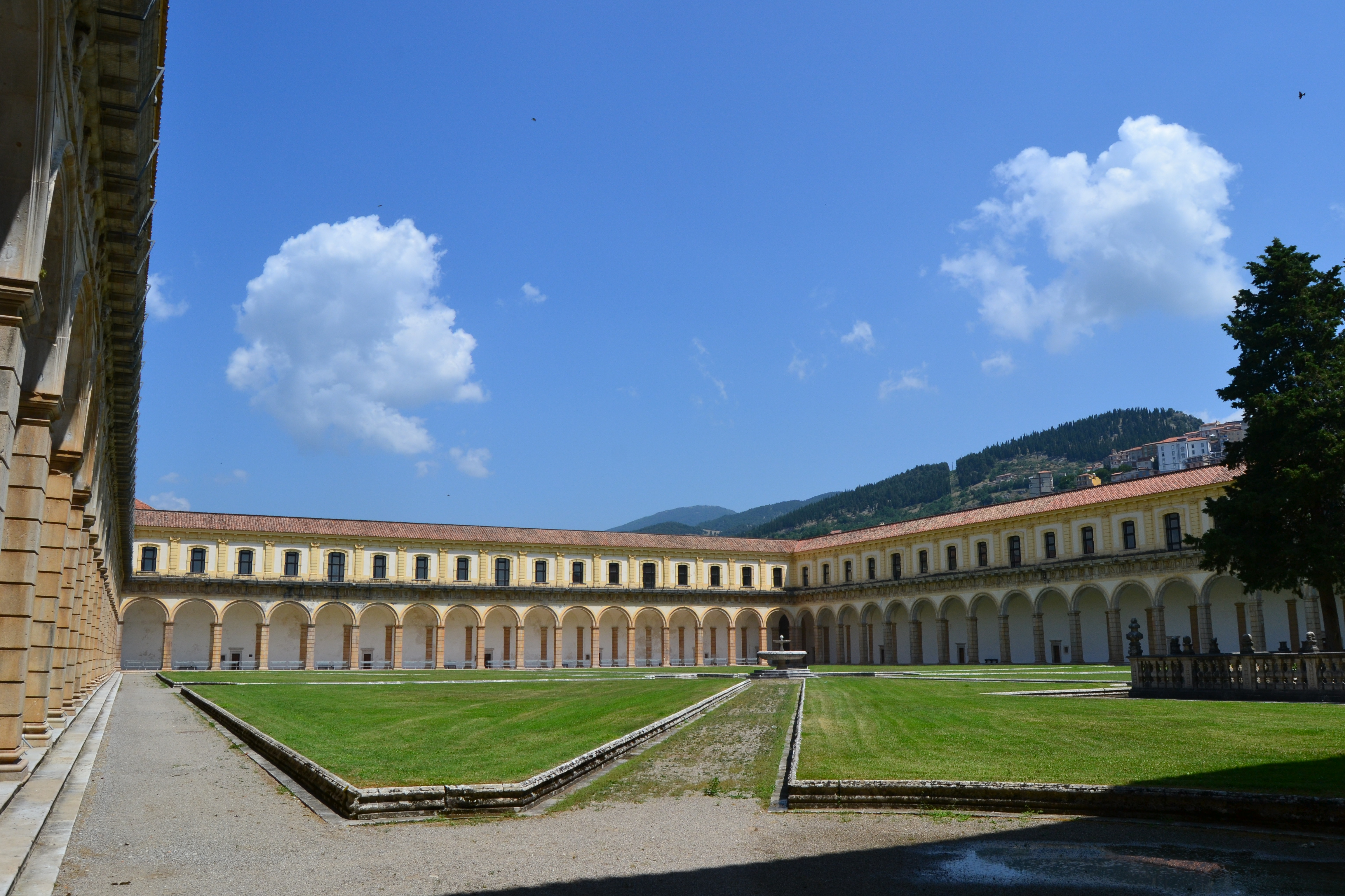 Chiostro grande della certosa di Padula